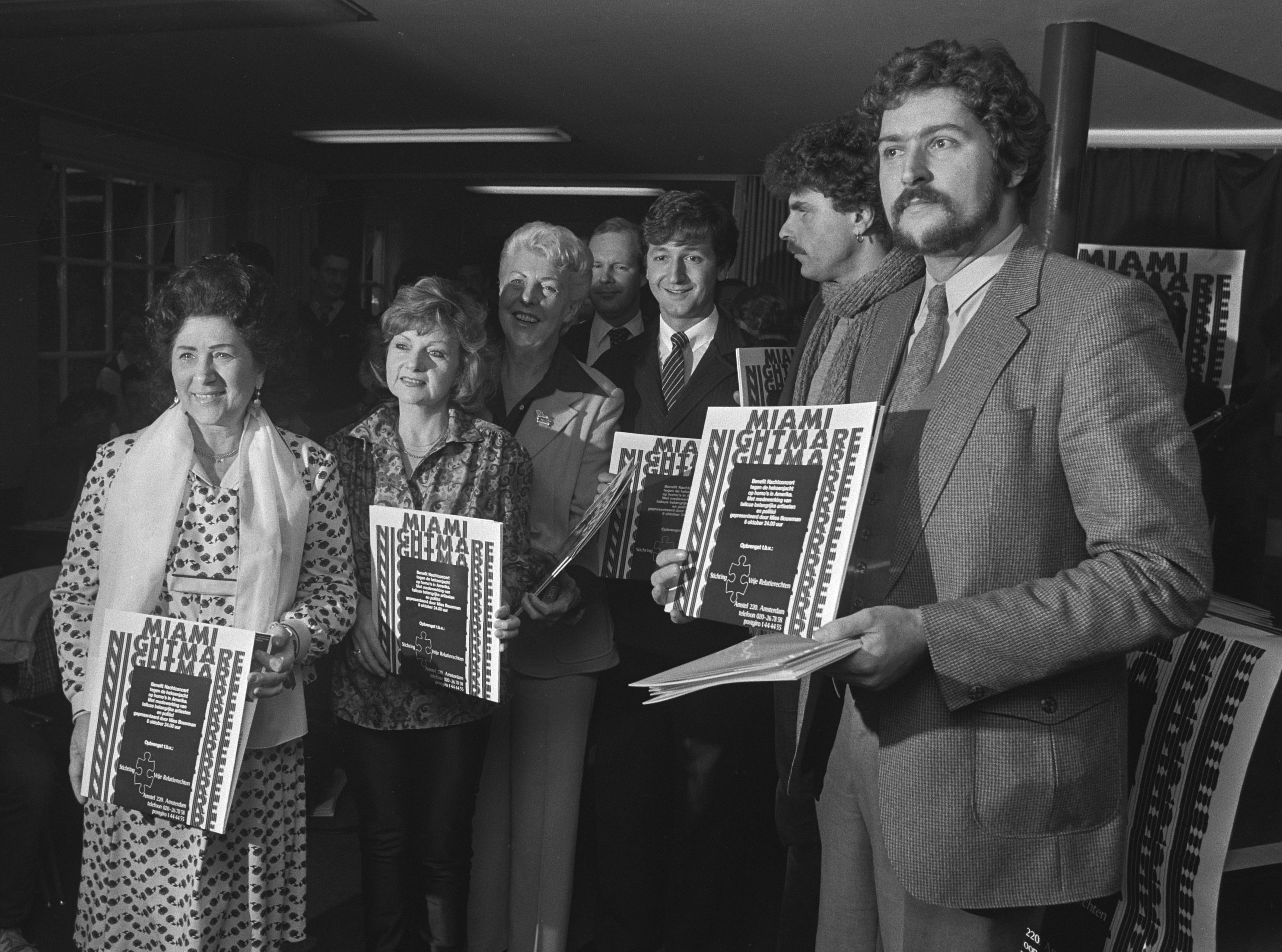 Collectie / Archief : Fotocollectie Anefo Reportage / Serie : [ onbekend ] Beschrijving : In Den Haag plaatopname pres. van Miami Nightmare , een 3 jaar geleden gegeven benefiet concert tijdens anti Anita Brijantmanifestatie Datum : 27 november 1980 Locatie : Den Haag, Zuid-Holland Trefwoorden : elpees, presentaties Fotograaf : Croes, Rob C. / Anefo Auteursrechthebbende : Nationaal Archief Materiaalsoort : Negatief (zwart/wit) Nummer archiefinventaris : bekijk toegang 2.24.01.05 Bestanddeelnummer : 931-1747